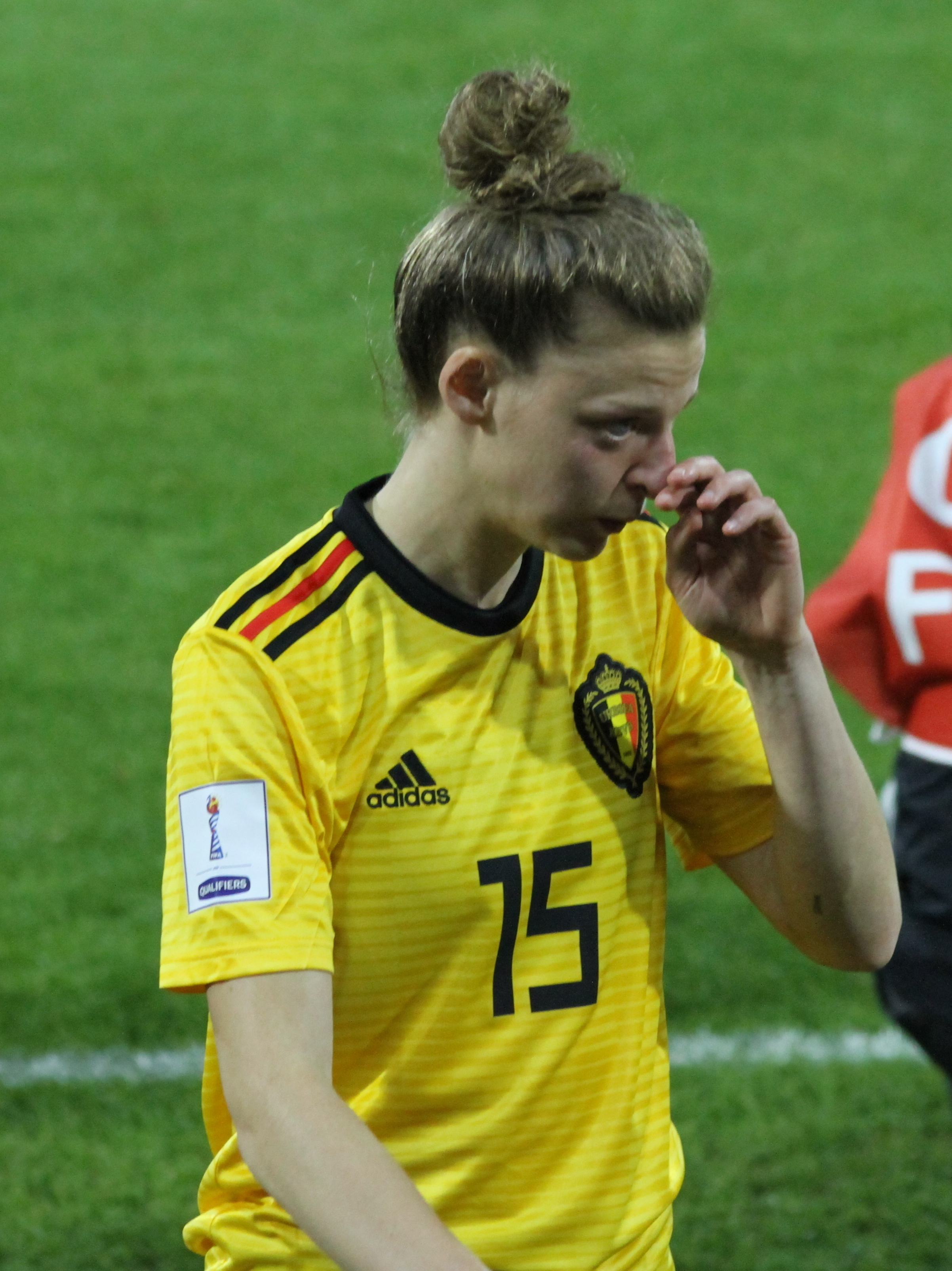 Yana Daniëls, nazionale di calcio femminile del Belgio, a fine incontro Italia-Belgio del 10 aprile 2018 allo stadio Mazza di Ferrara.